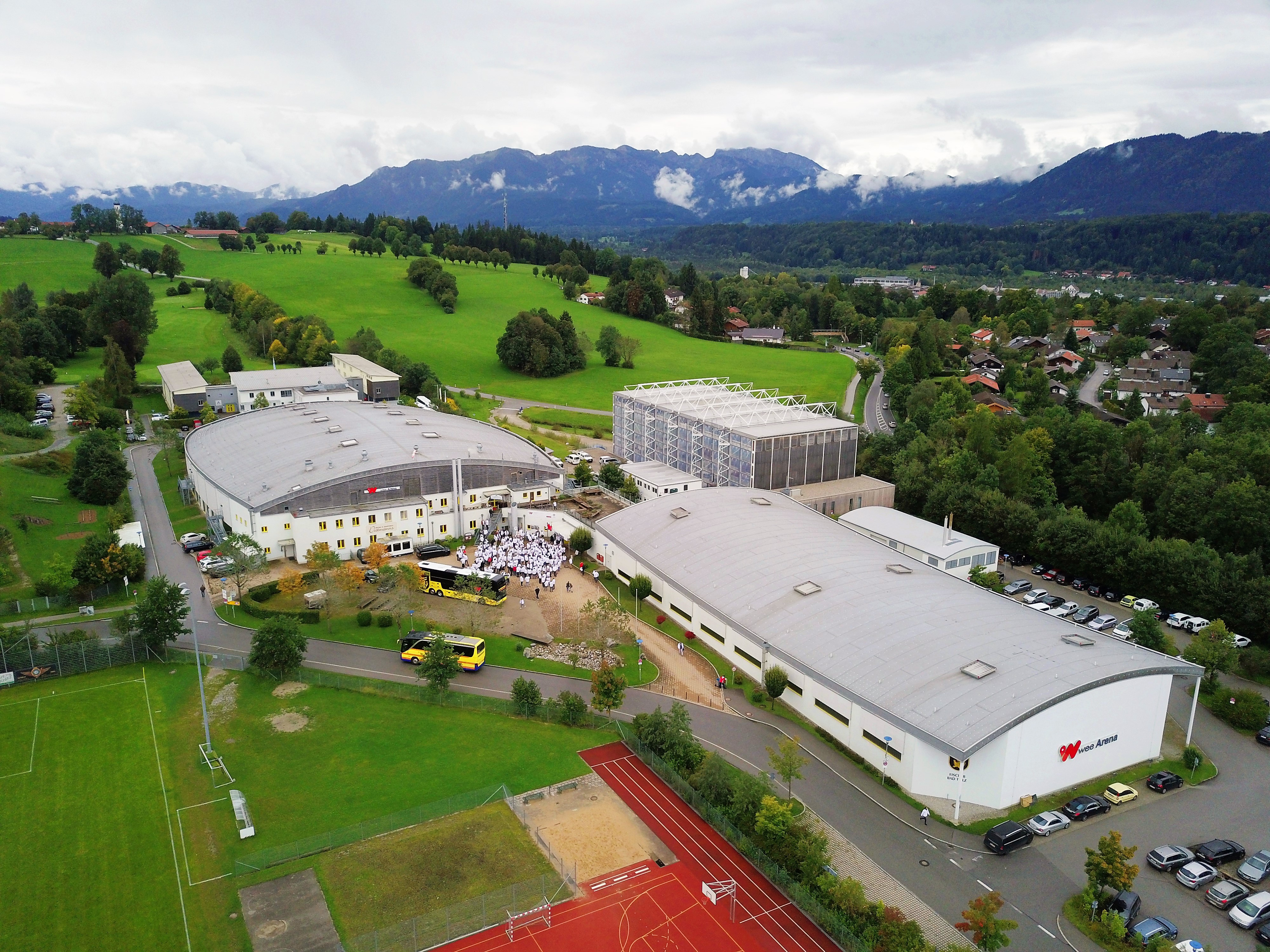 Luftaufnahme der weeArena in Bad Tölz.